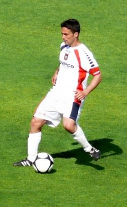 Opera mia, Antonio Galardo in azione Licensing Galardo, Antonio